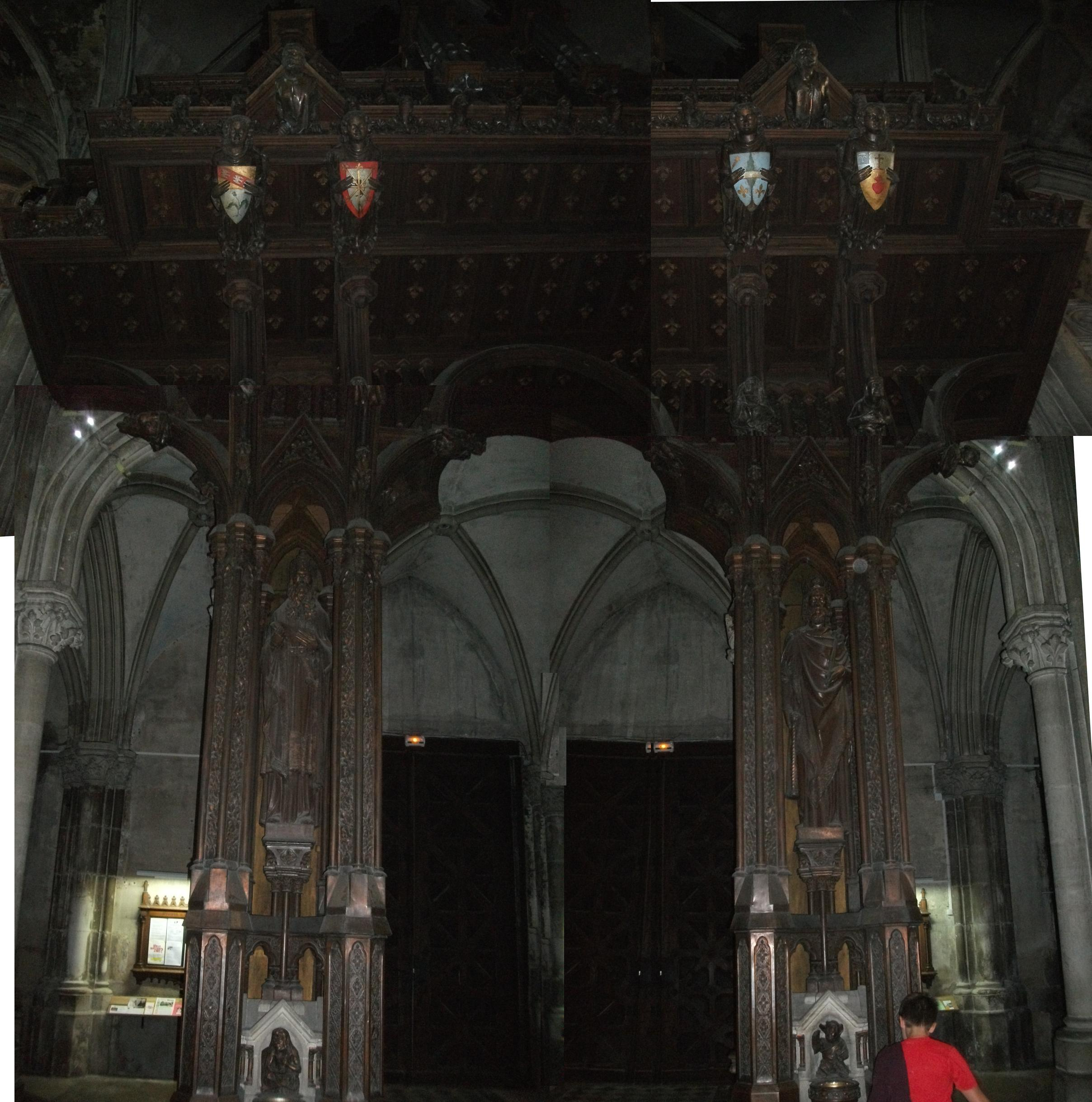 support armorié et ouvragé de l'orgue de l'église saint-léon IX de Nancy, il se trouve au-dessus de la porte d'entrée et est encore en usage. Le buffet d'orgue fut réalisé par le célèbre ébéniste de l'école de Nancy : Eugène Vallin. Armoiries, de gauche à droite : 1. Ville de Nancy ; 2. inconnu ; 3. inconnu ; 4. Mgr Turinaz, évêque de Nancy.